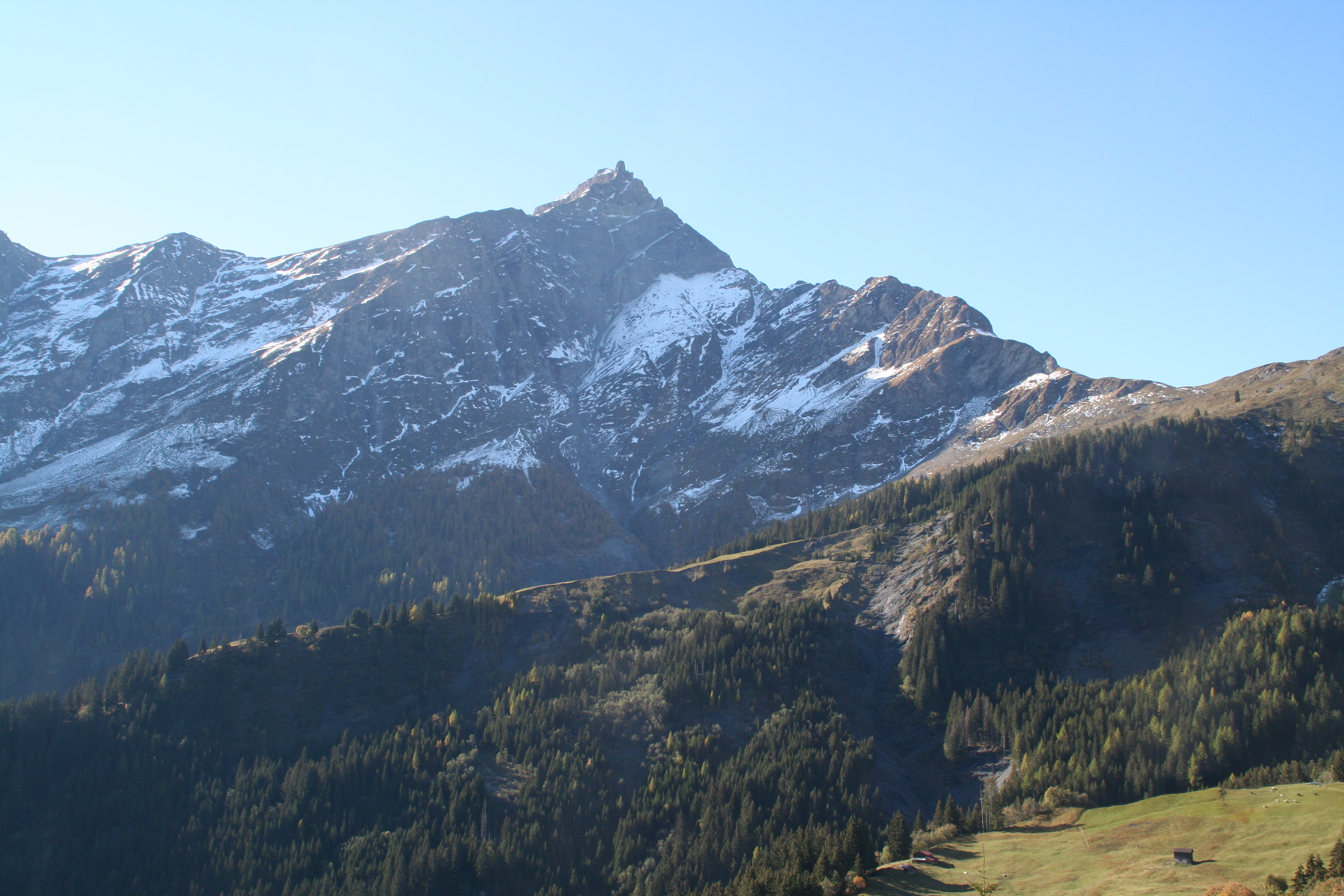 Piz Beverin Ansicht von Norden von Obertschappina am Heinzenberg